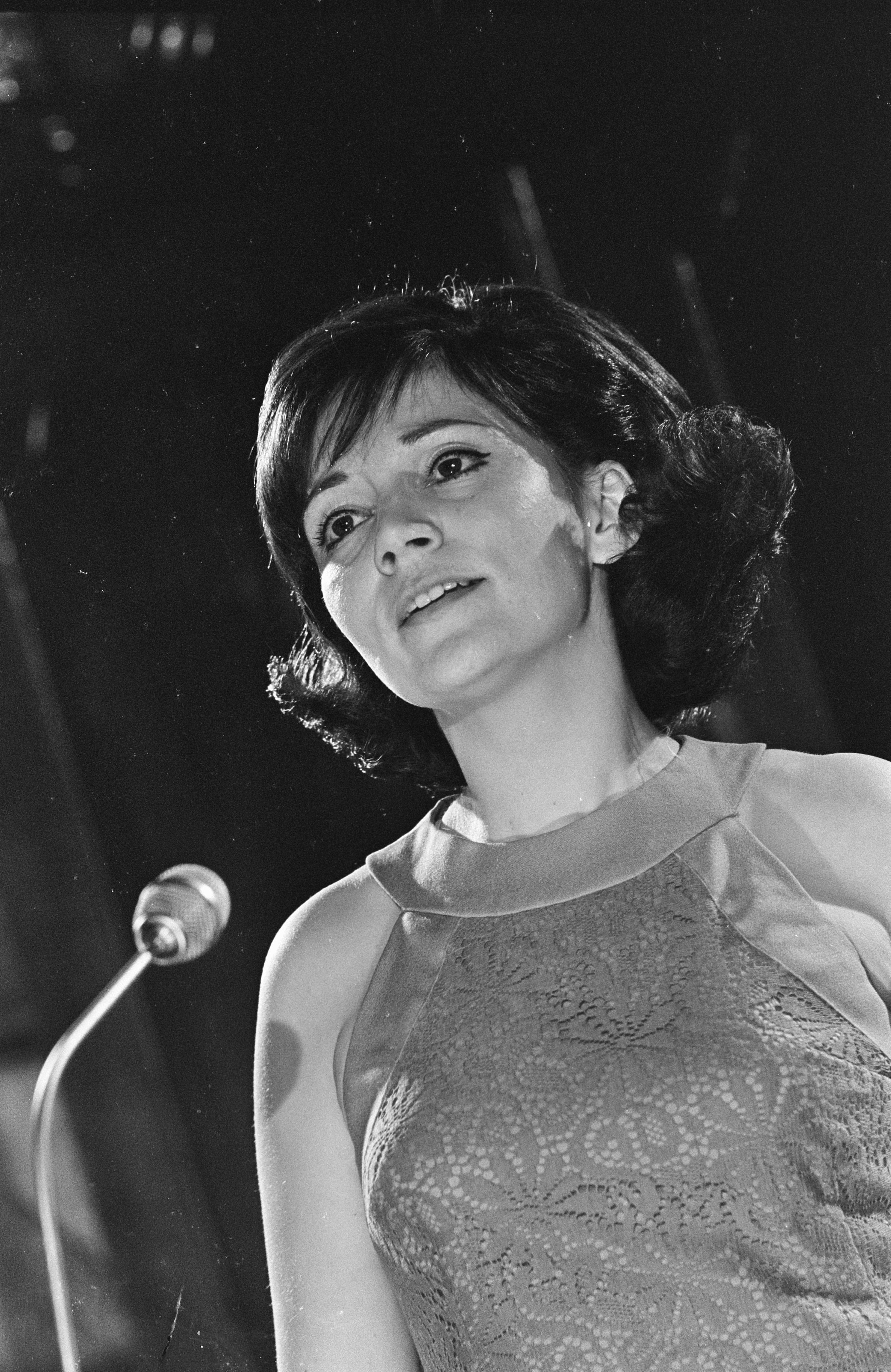 Collectie / Archief : Fotocollectie Anefo Reportage / Serie : [ onbekend ] Beschrijving : Thérèse Steinmetz tijdens repetitie voor Nederlands Songfestival Datum : 22 februari 1967 Trefwoorden : SONGFESTIVALS Persoonsnaam : Steinmetz, Thérèse Fotograaf : Nijs, Jac. de / Anefo Auteursrechthebbende : Nationaal Archief Materiaalsoort : Negatief (zwart/wit) Nummer archiefinventaris : bekijk toegang 2.24.01.05 Bestanddeelnummer : 920-1000